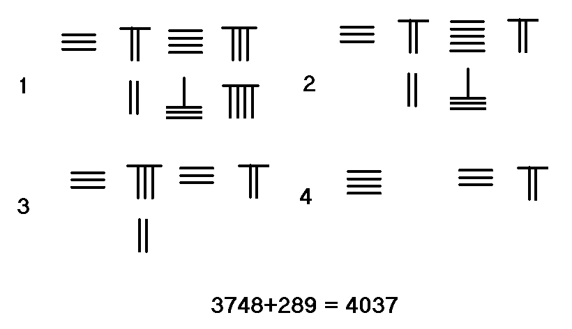 Rod calculus addition with carry 筹算进位加法